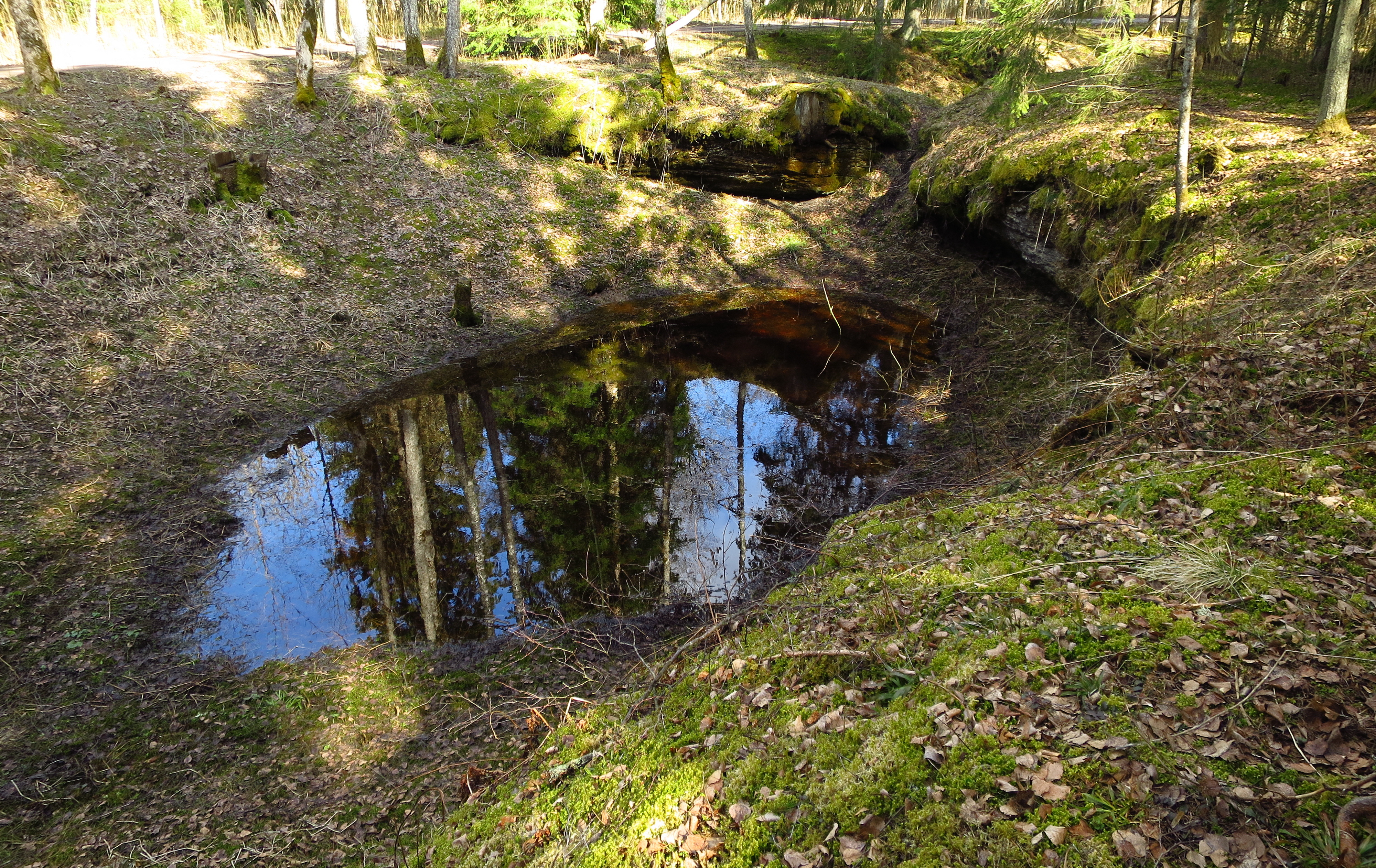 Kuimetsa maastikukaitseala